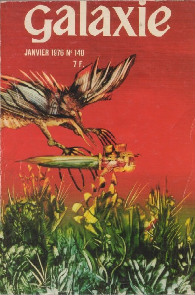 Illustration de couverture du magazine Galaxie n°140